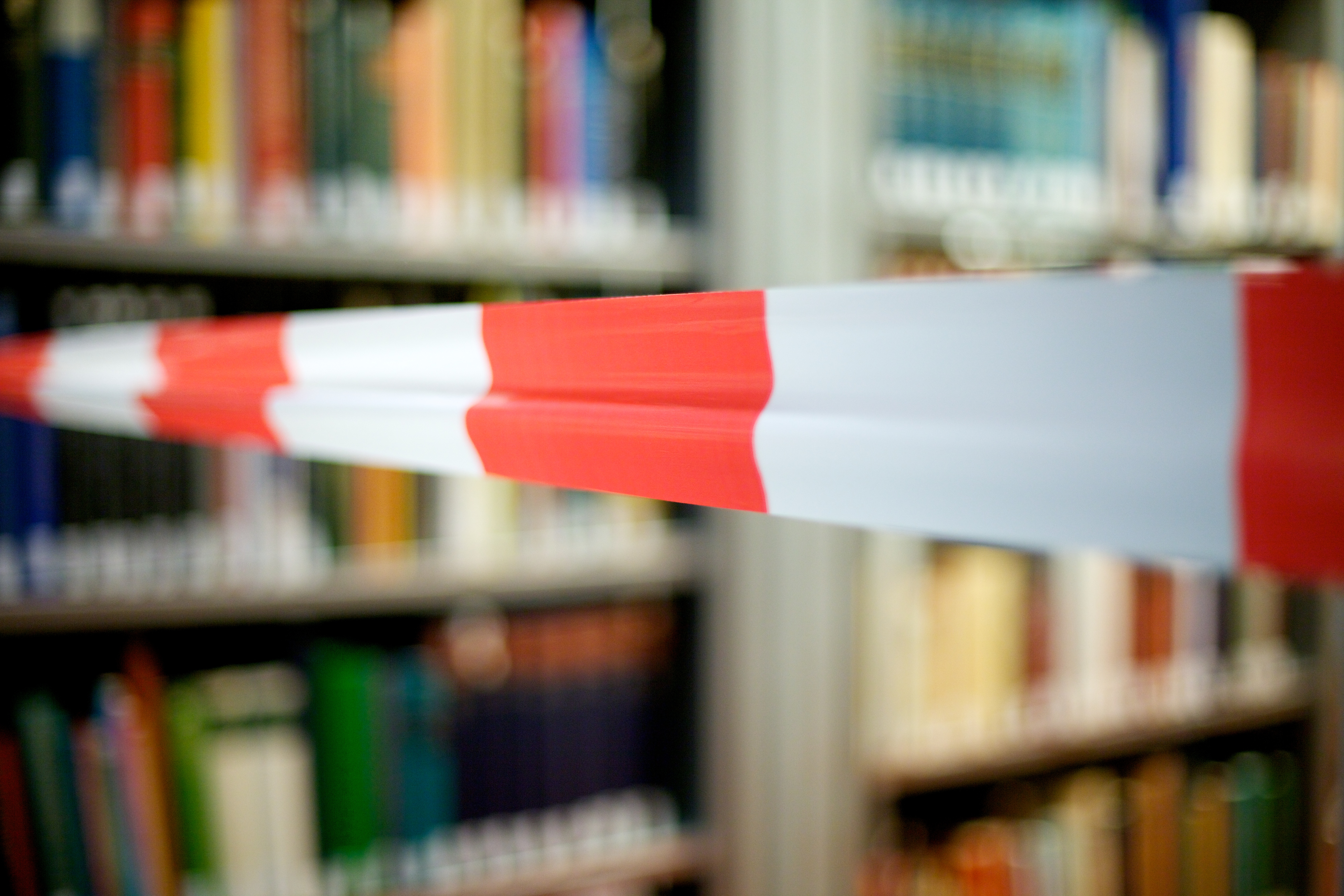 Wikimedia NL Nieuwjaarsborrel in De Bijzondere Collecties, Universiteit van Amsterdam.